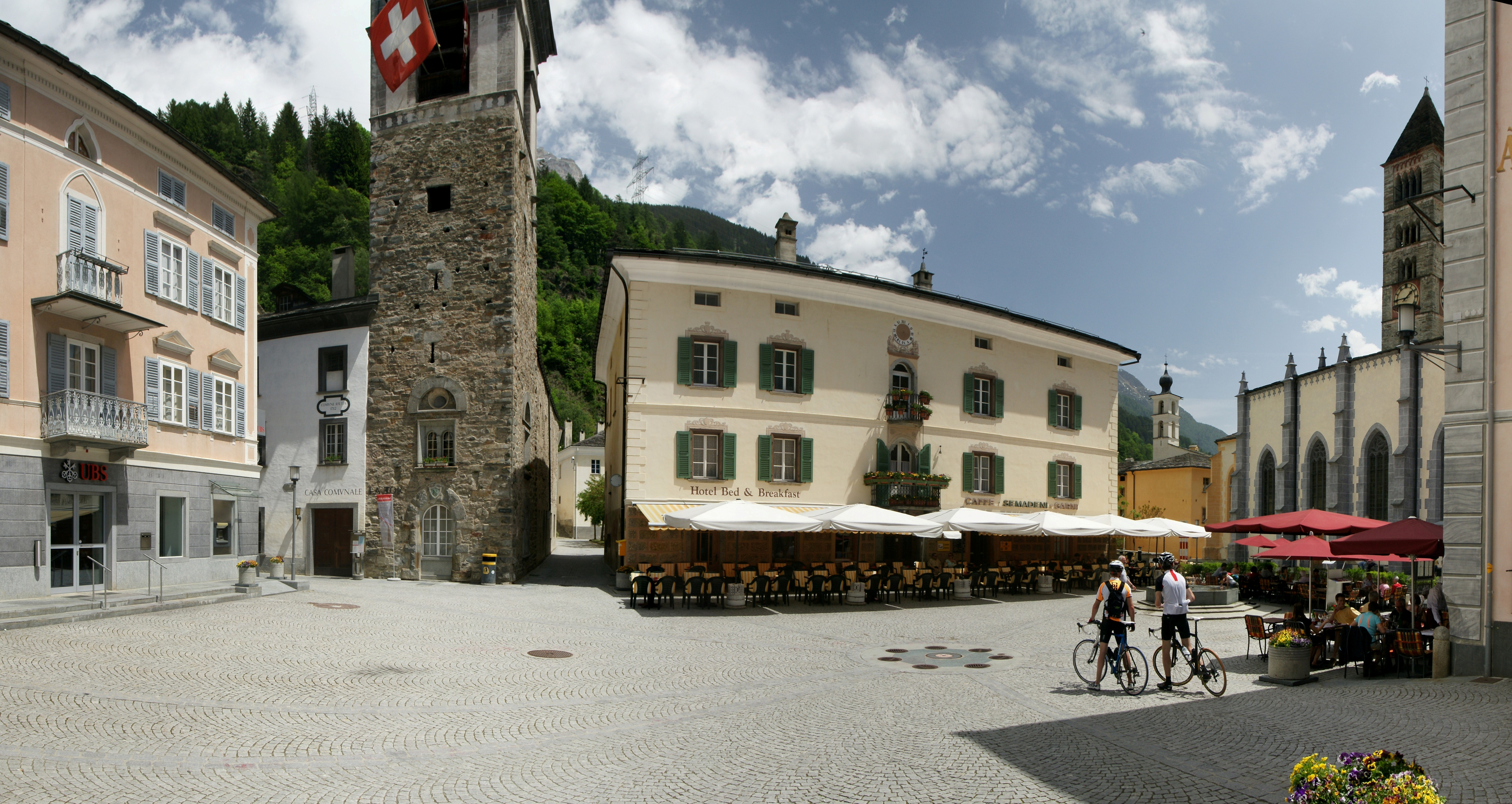 Piazza di Communale. Poschiavo (deutsch/rätoromanisch Puschlav) ist eine politische Gemeinde im südlichen Graubünden (Schweiz). Zusammen mit der Nachbargemeinde Brusio bildet Poschiavo die Talschaft Valposchiavo (deutsch: Puschlav) und den Bezirk Bernina.